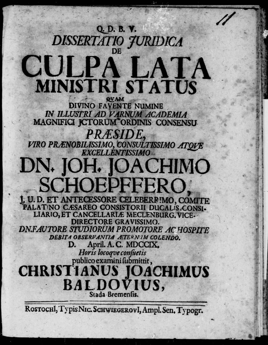 Frontespizio